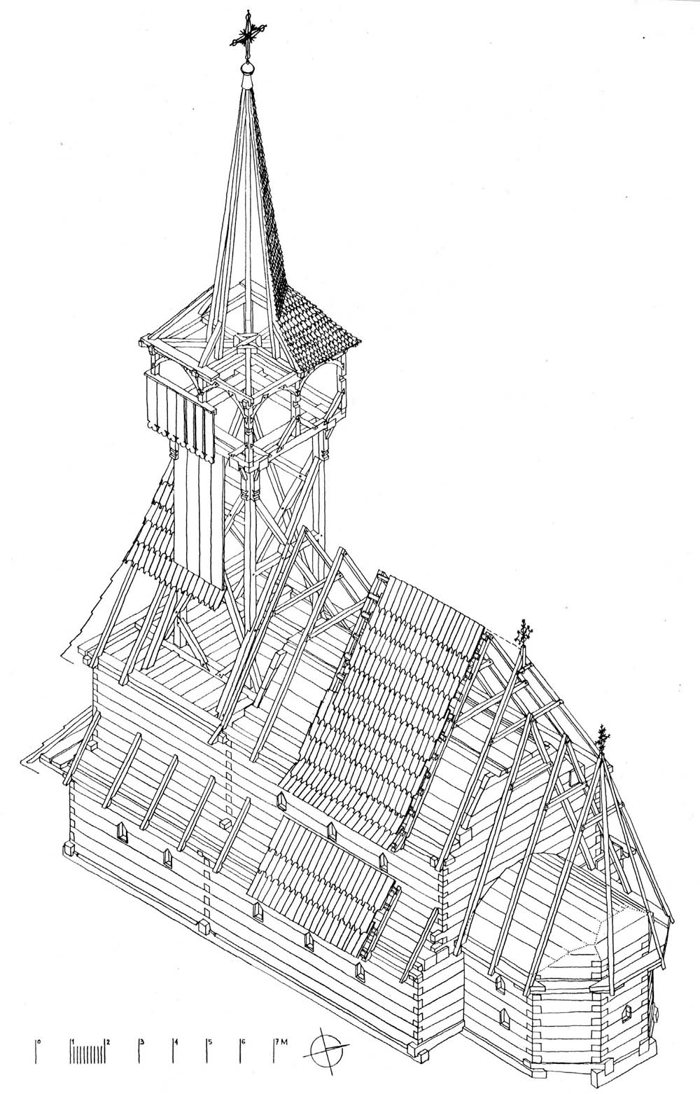 Ieud Deal, axonometrie. Desen: Alexandru Baboş, iulie 1997.